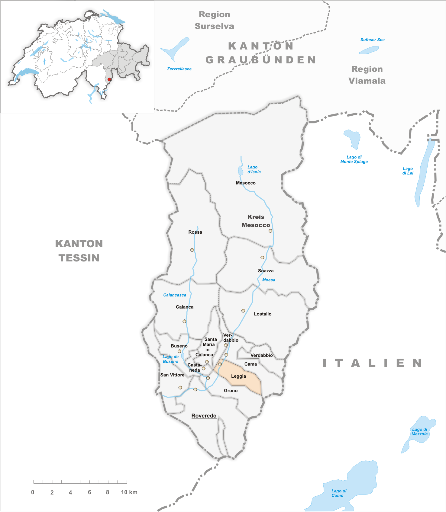 Municipality Leggia